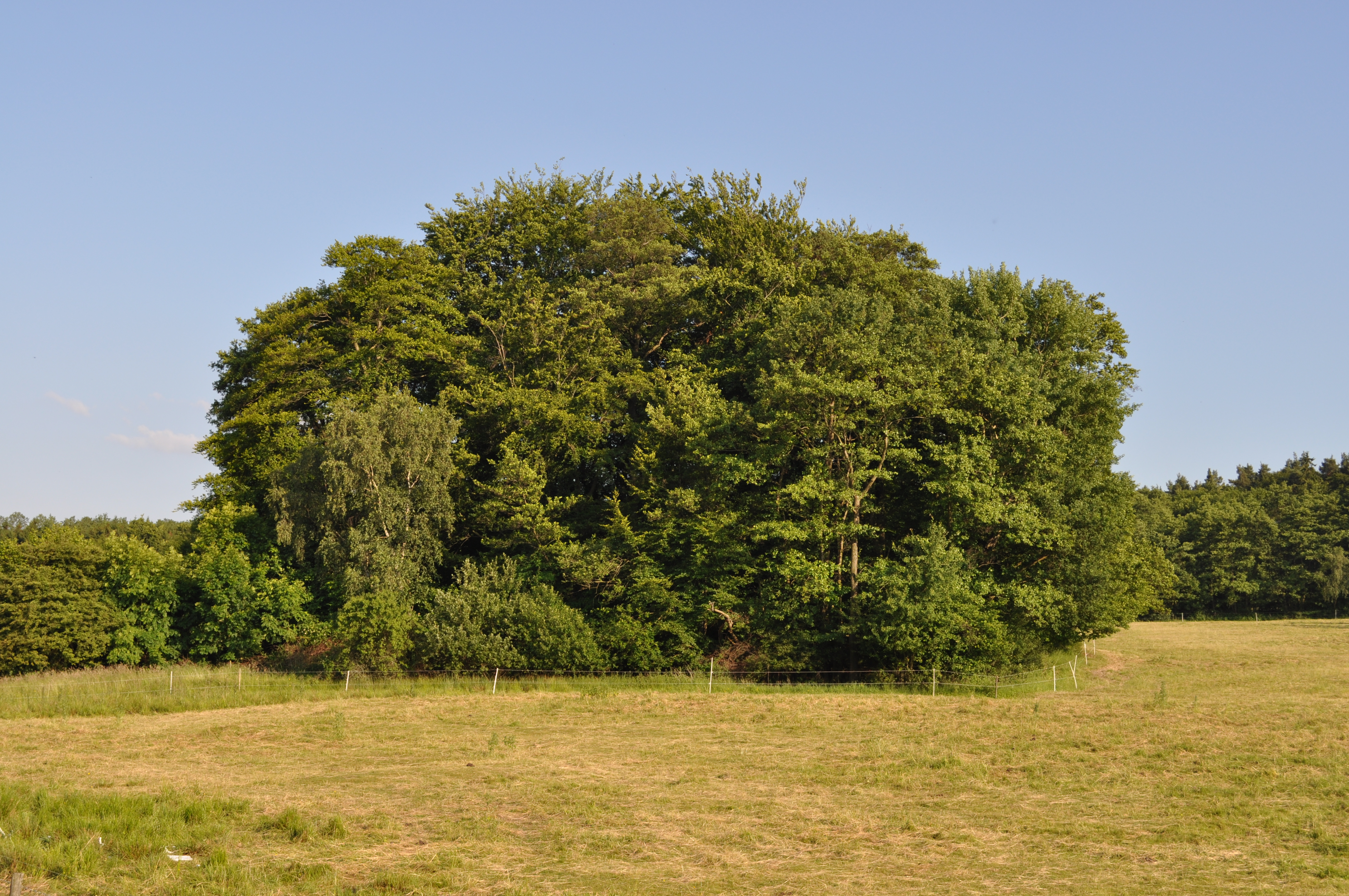 Drusenknüppel in Obernhain. Es handelt sich um einen Hügel, auf dem im Mittelalter eine Holzburg, eine sogenannte Motte stand.